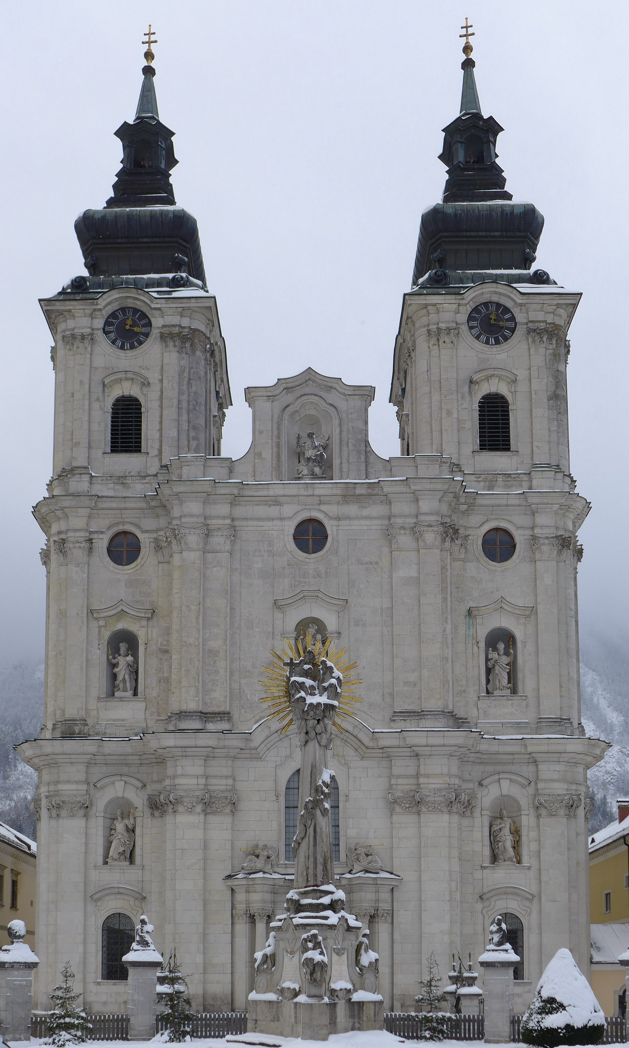 Stiftskirche Spital am Pyhrn, Außenfassade mit Türmen